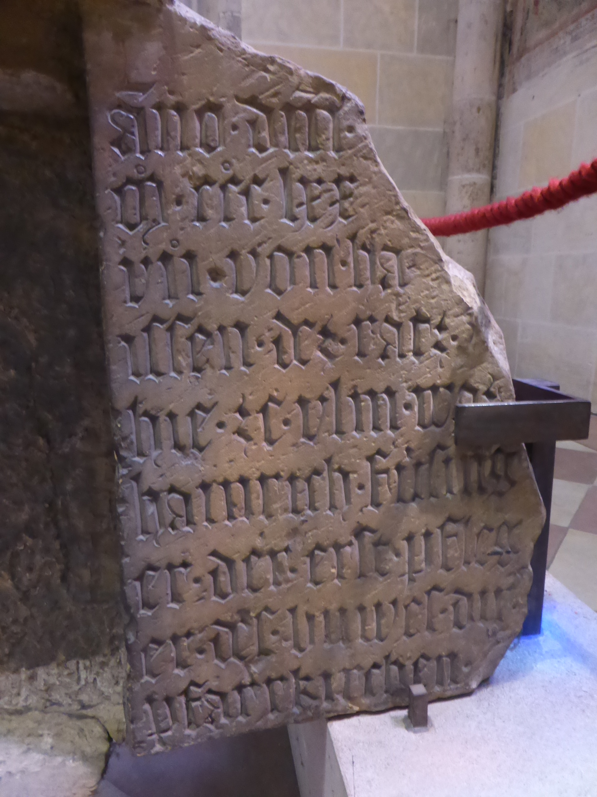 Der Baupfleger des Ulmer Münster zweckentfremdete einen jüdischen Grabstein, indem er auf der Rückseite sein Wappen und diese Inschrift anbringen ließ